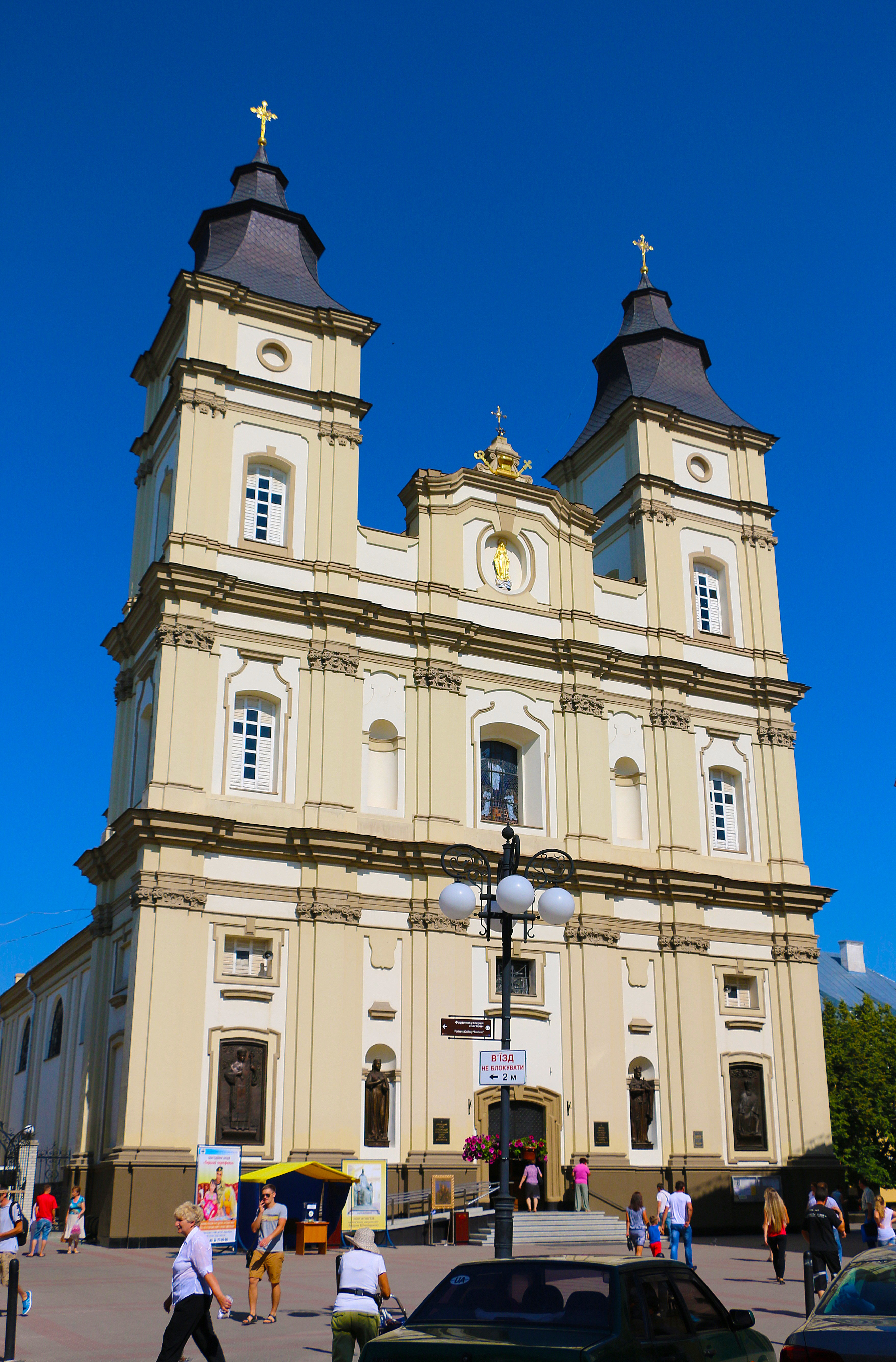 Костел Єзуїтів (Собор Святого Воскресіння), Івано-Франківськ, Майдан Шептицького, 22